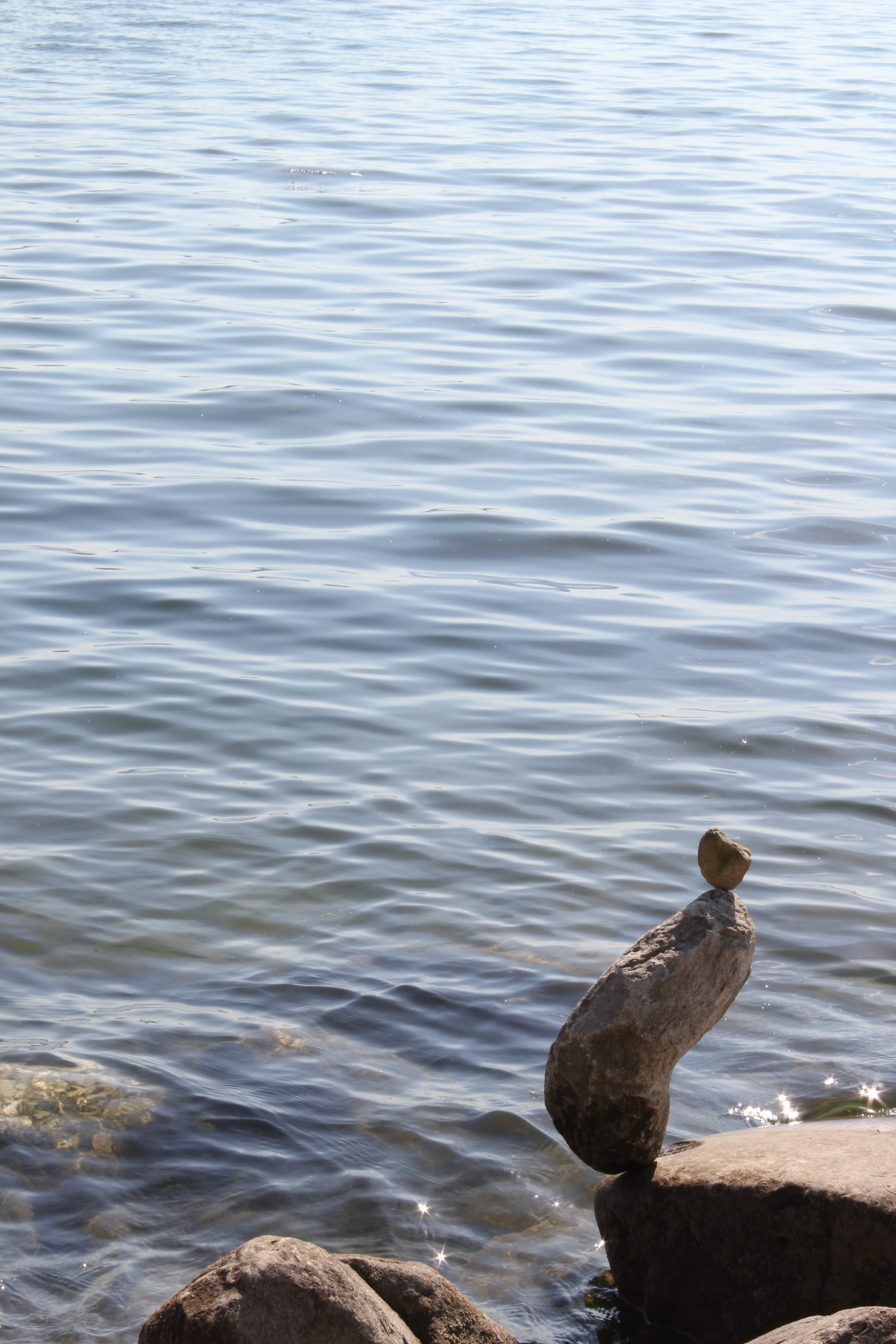 Steinkunst von Josef „Sepp“ Bögle, Radolfzell, Juni 2011